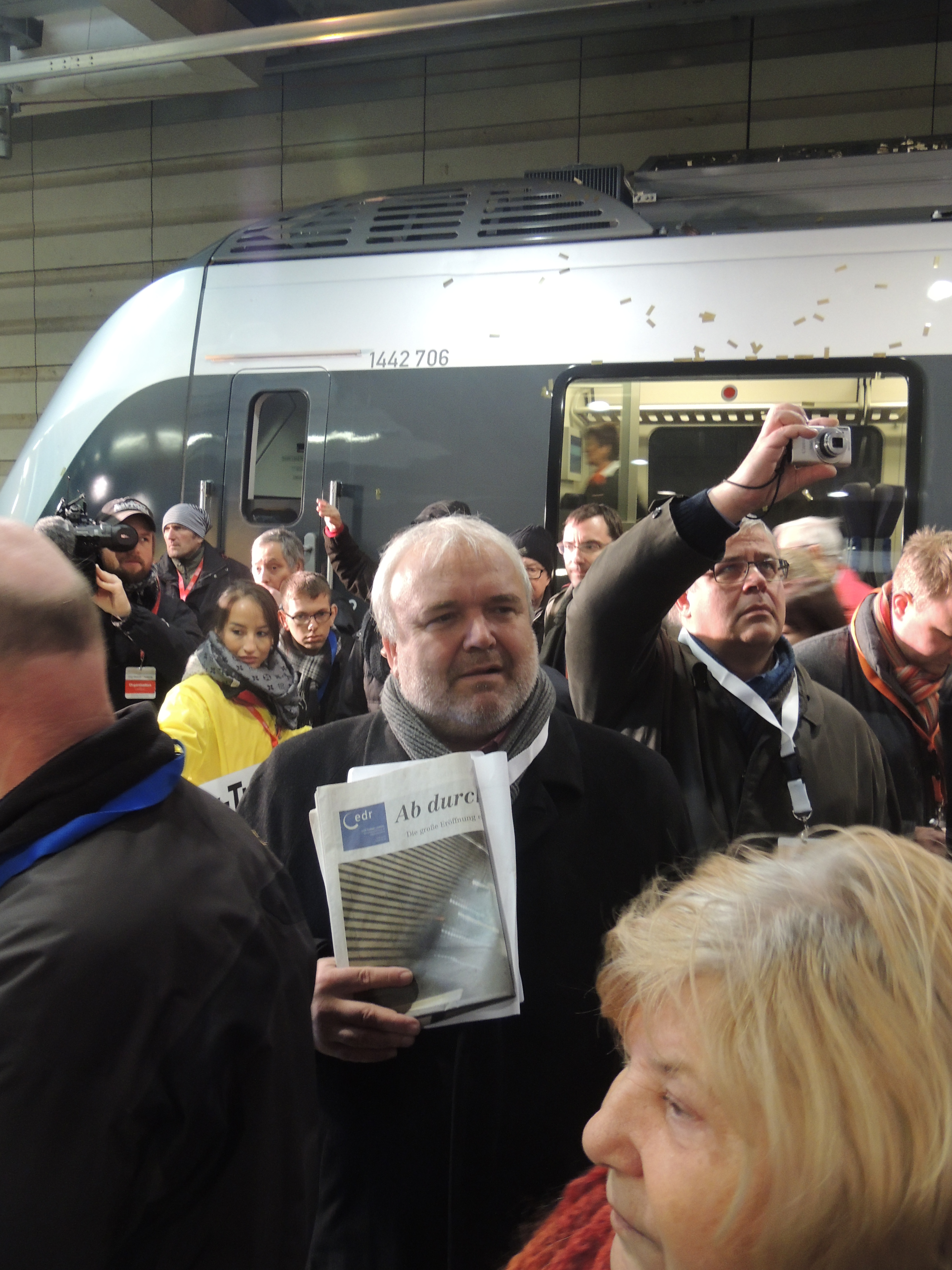 Jörg Junhold (Direktor des Leipziger Zoos) zur Eröffnungsveranstaltung im Leipziger Hauptbahnhof (tief)